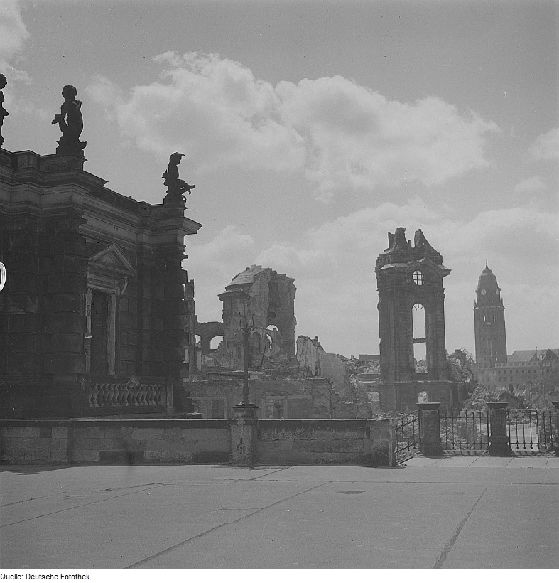 Original image description from the Deutsche Fotothek Dresden. Blick von der Brühlschen Terrasse nach Süden gegen die Frauenkirche